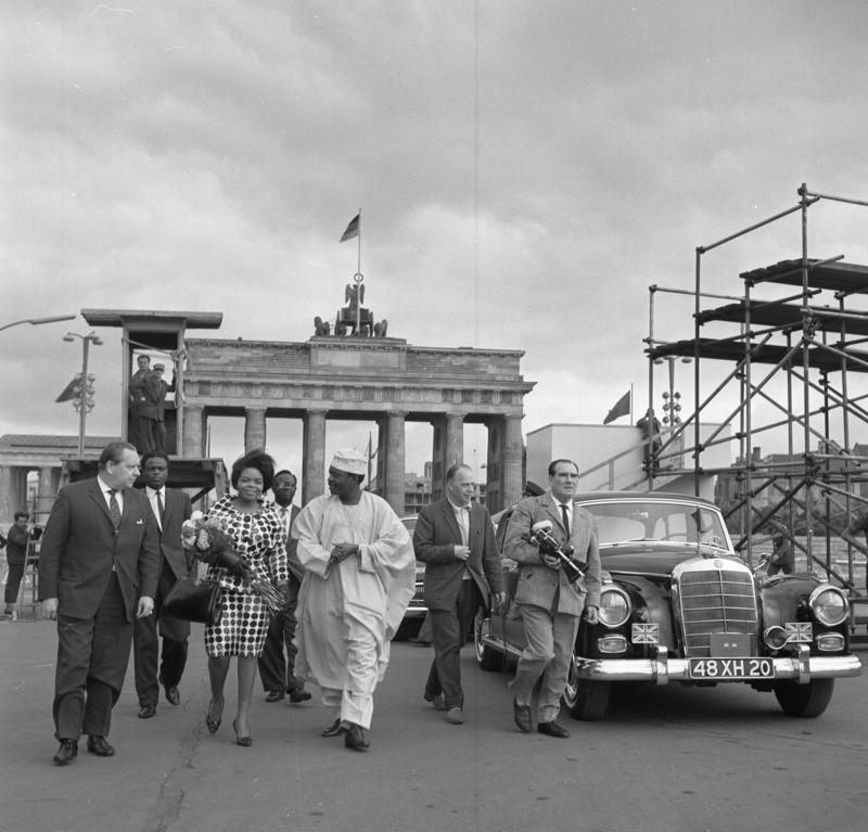 Besuch des nig. Inform. Min. Benson a/Brdbg Tor [Nigerianischer Informationsminister Benson am Brandenburger Tor]